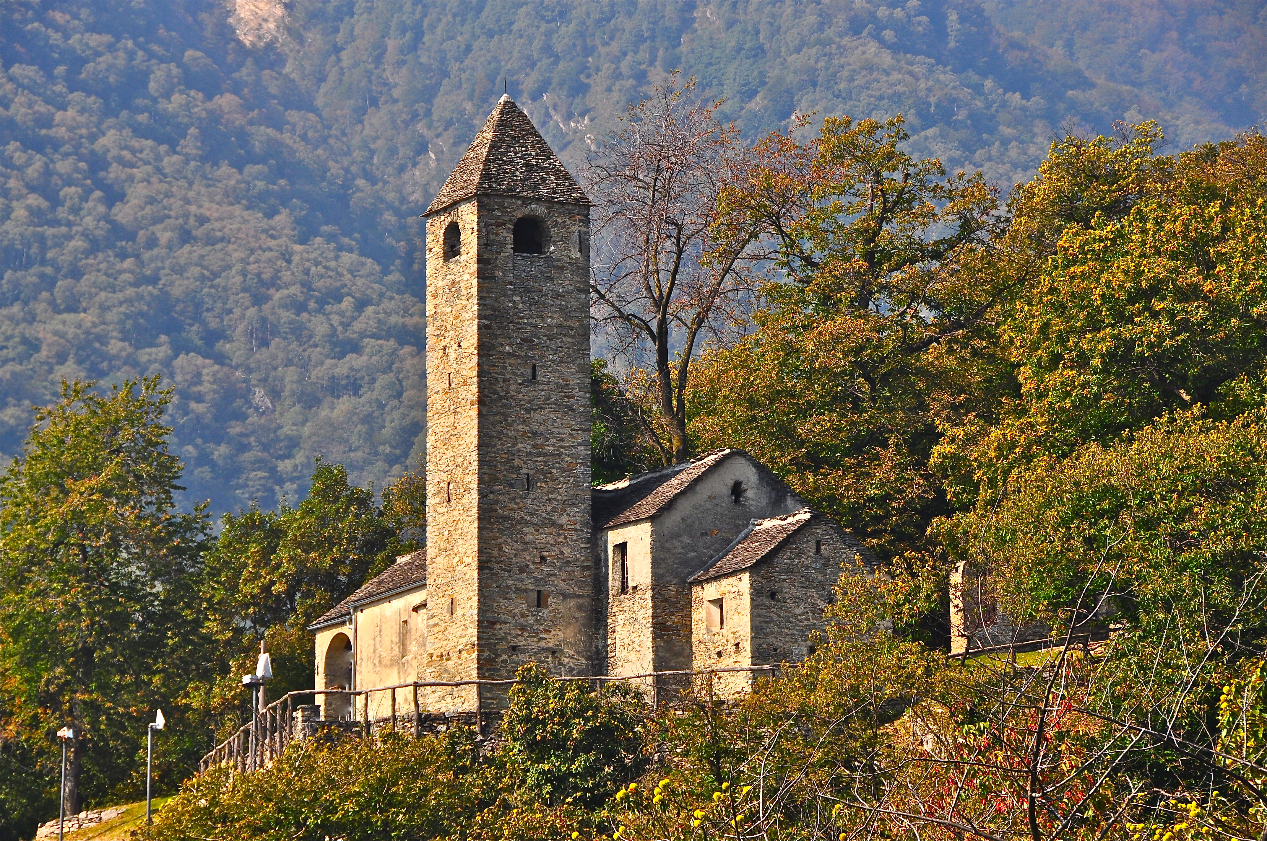 La Chiesa vista dal sentiero verso il Curzùtt (insediamento medievale)